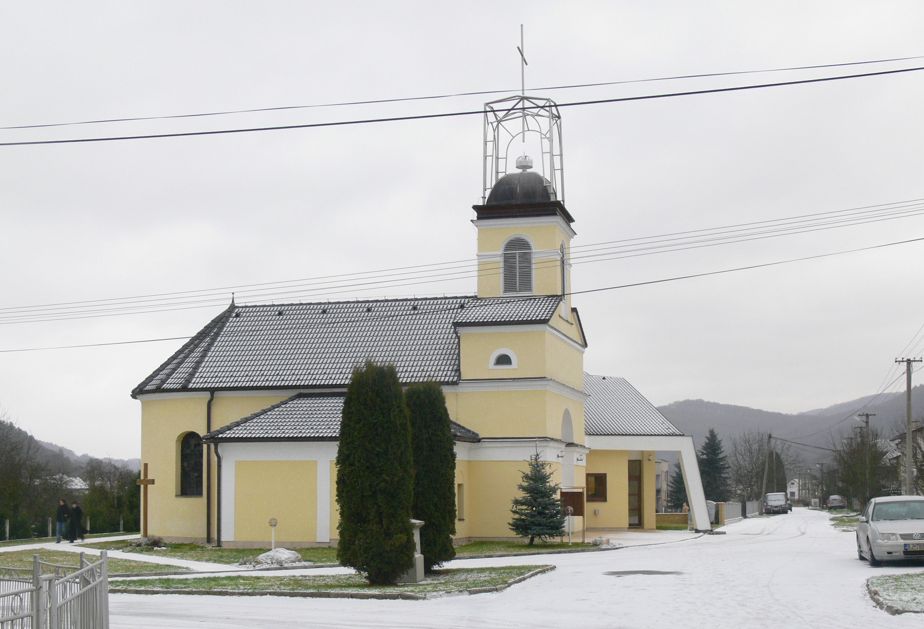 Pohľad na rímskokatolícky kostol v strede obce Komárov